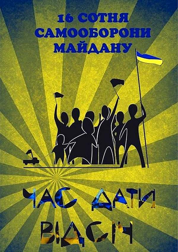 16-а сотня «Відсіч» на Євромайданi, сотник Іванов Олександр. Жіноча чота, чотова Катерина Чепура Львівська чота, чотова Христина Груник